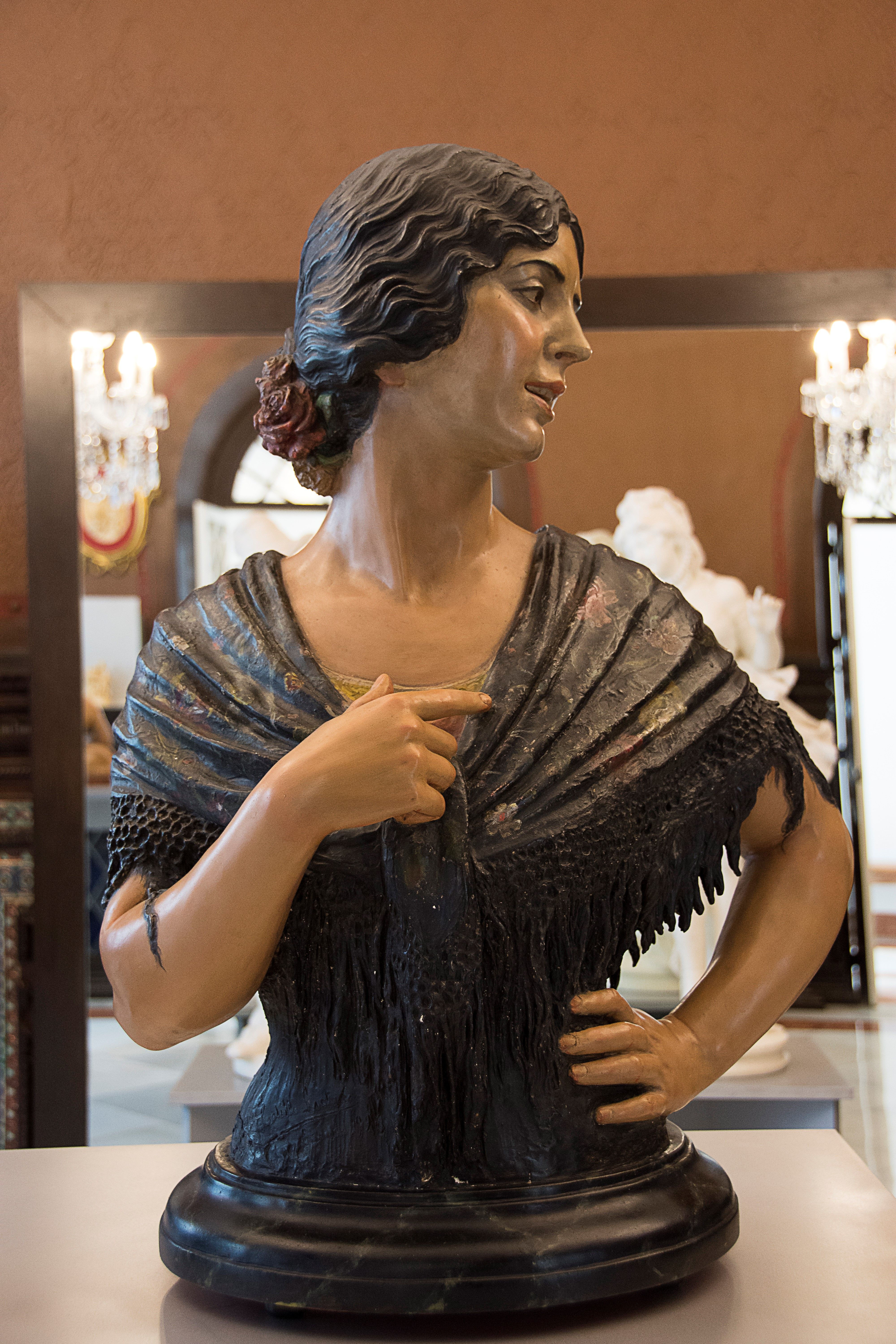 Andaluza (una sevillana). Autor: Antonio Castillo Lastrucci. Siglo XX. Colección Mariano Bellver. Sevilla, (España).